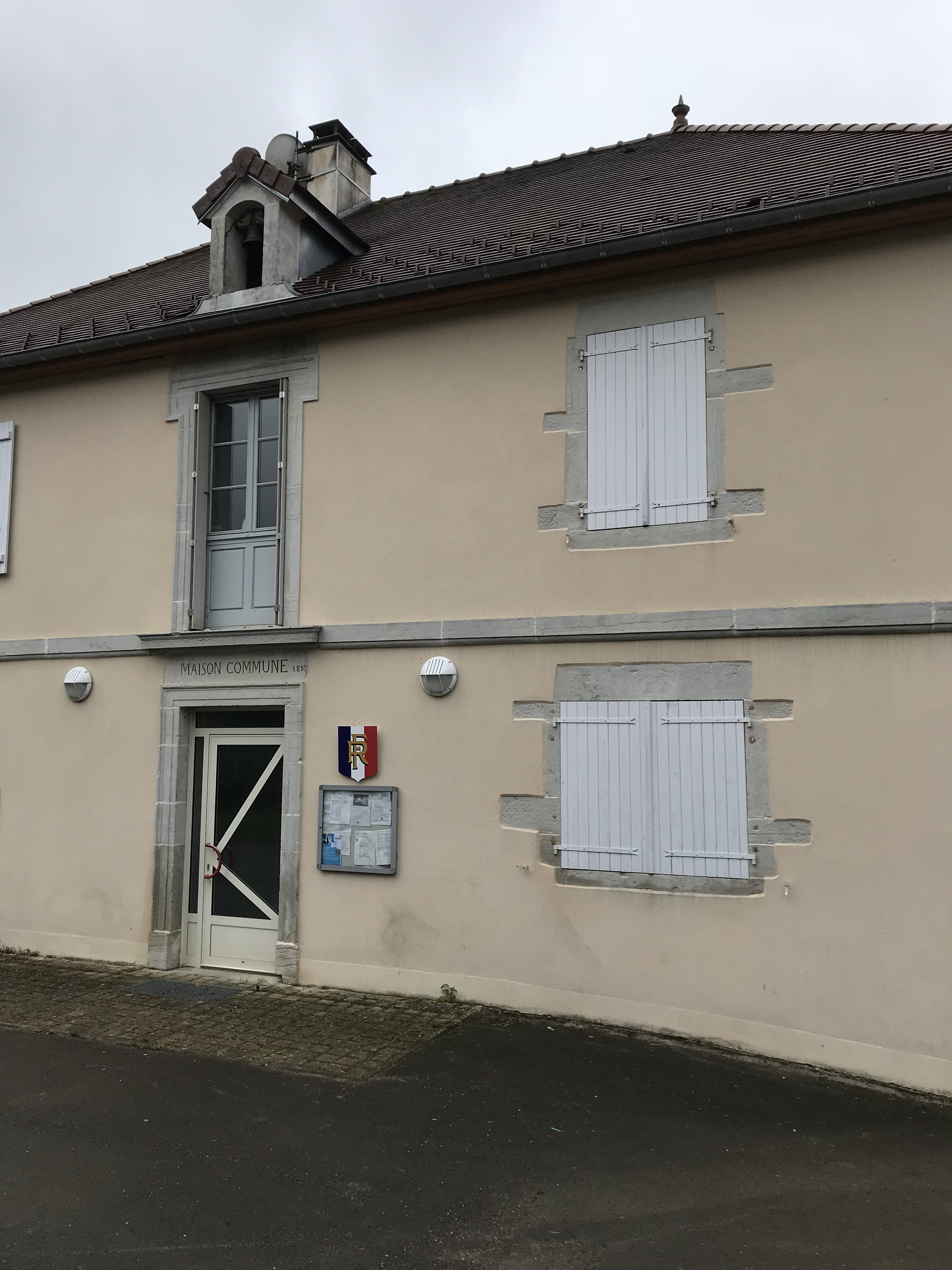 Marnézia (Jura, France) en octobre 2017.